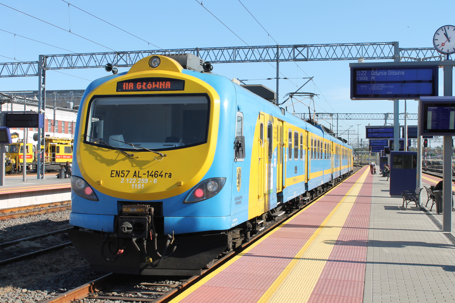 Zmodernizowany elektryczny zespół trakcyjny EN57AL-1464 stoi na stacji Bydgoszcz Główna. The making of this document was supported by Wikimedia Polska Association, within Wikigrant no. WG 2015-34. English | polski | +/−